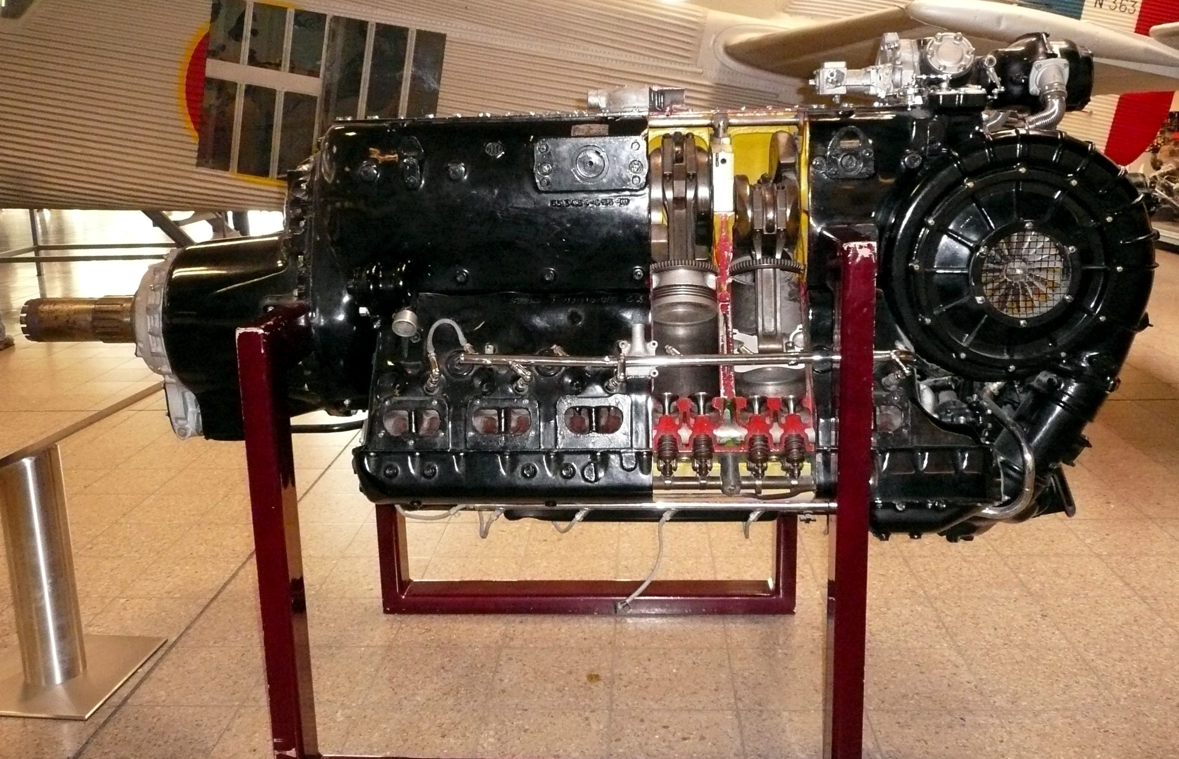 Daimler-Benz DB 603 E Flugzeugmotor Baujahr 1944 von links gesehen. Ausgestellt im deutschen Museum München.